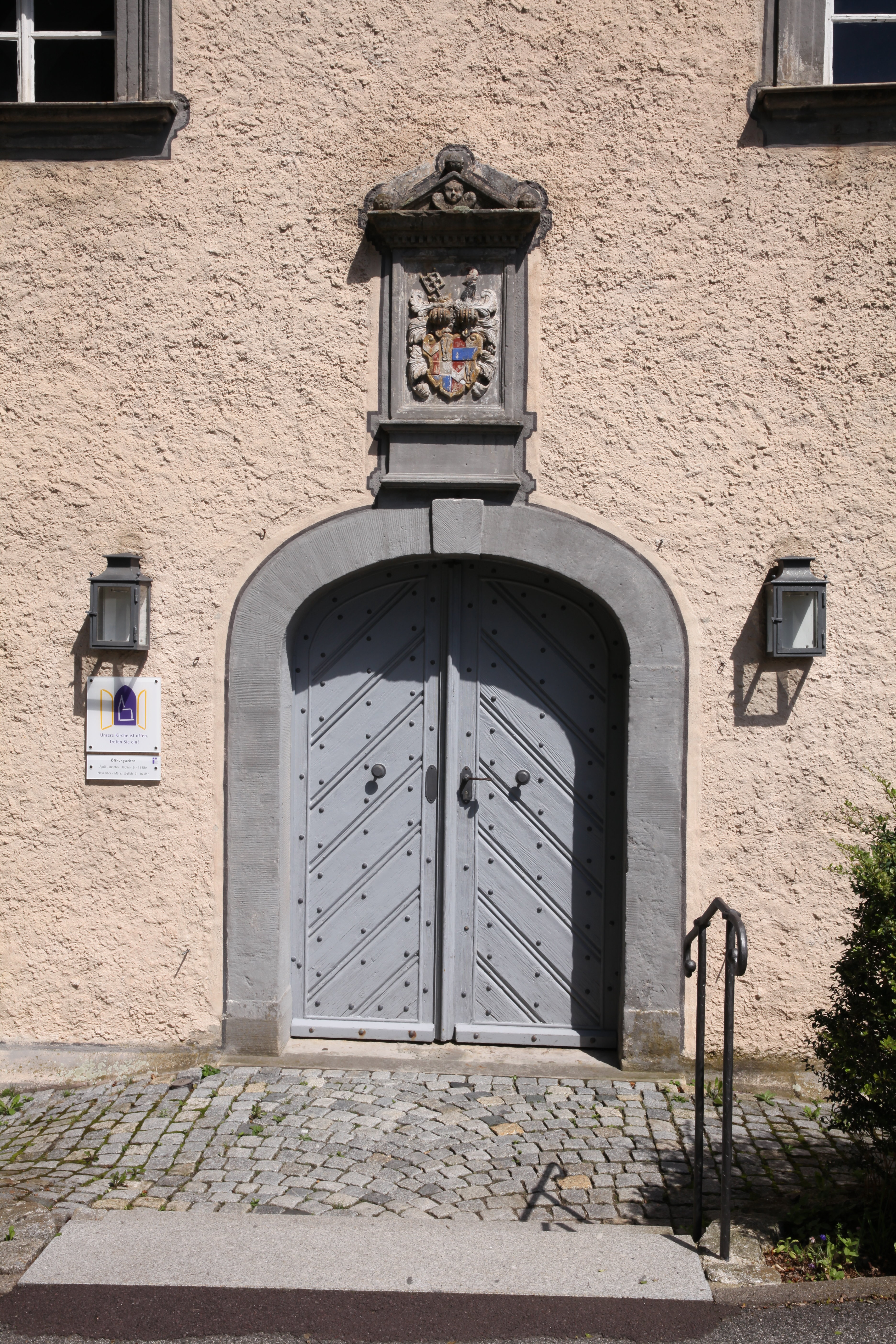 Schloßkirche in Niederfüllbach